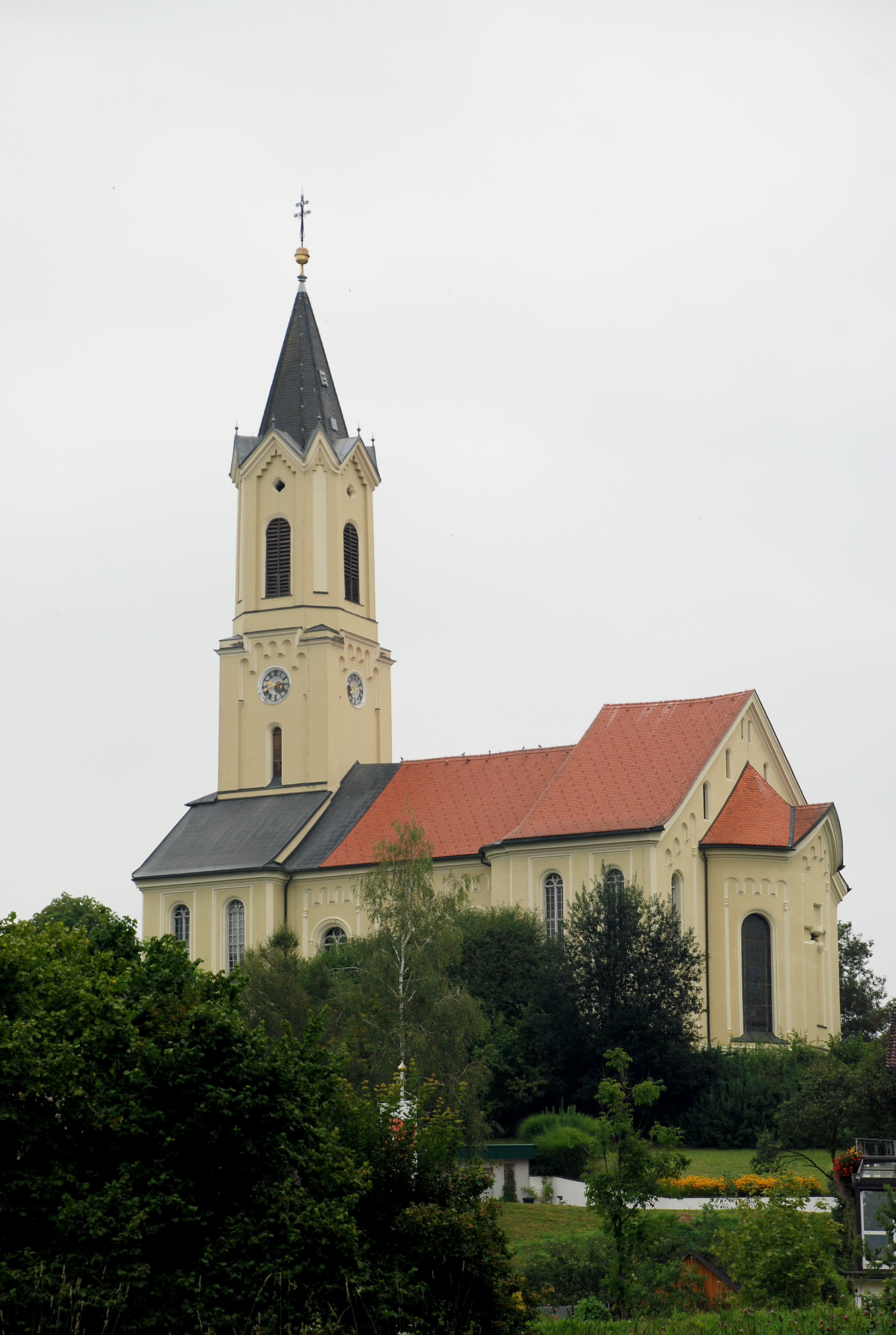 St. Josef, Weststeiermark, Österreich: Pfarrkirche St. Josef